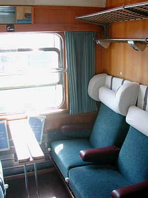 Tågkupé. Förstaklasskupé av klassisk europeisk modell